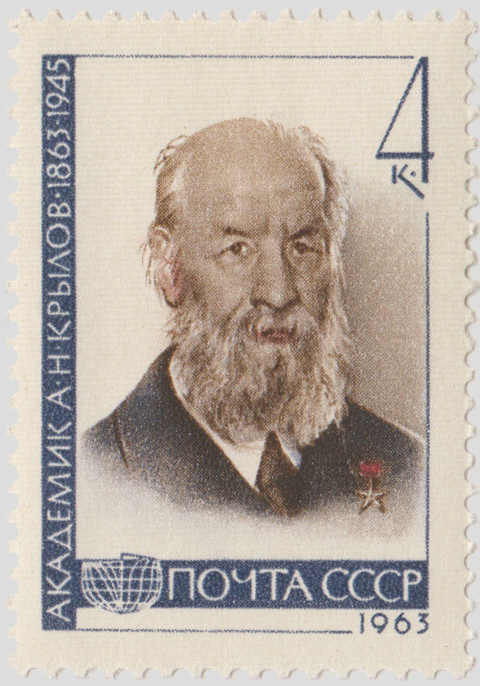 Почтовая марка СССР - Крылов Алексей Николаевич, Герой Социалистического Труда